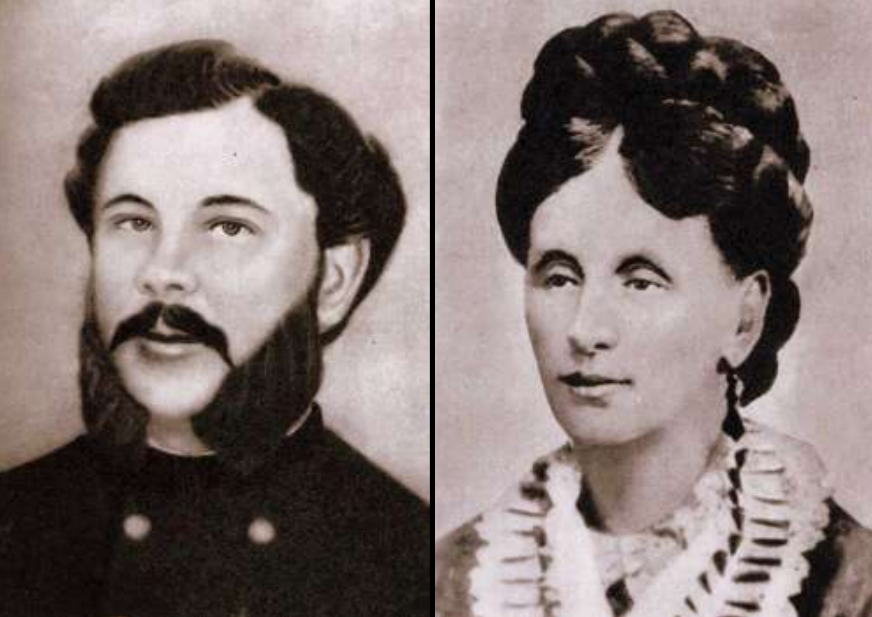 Батьки Коцюбинського. Михайло Матвійович та Гликерія Максимівна, в дівоцтві Абаз